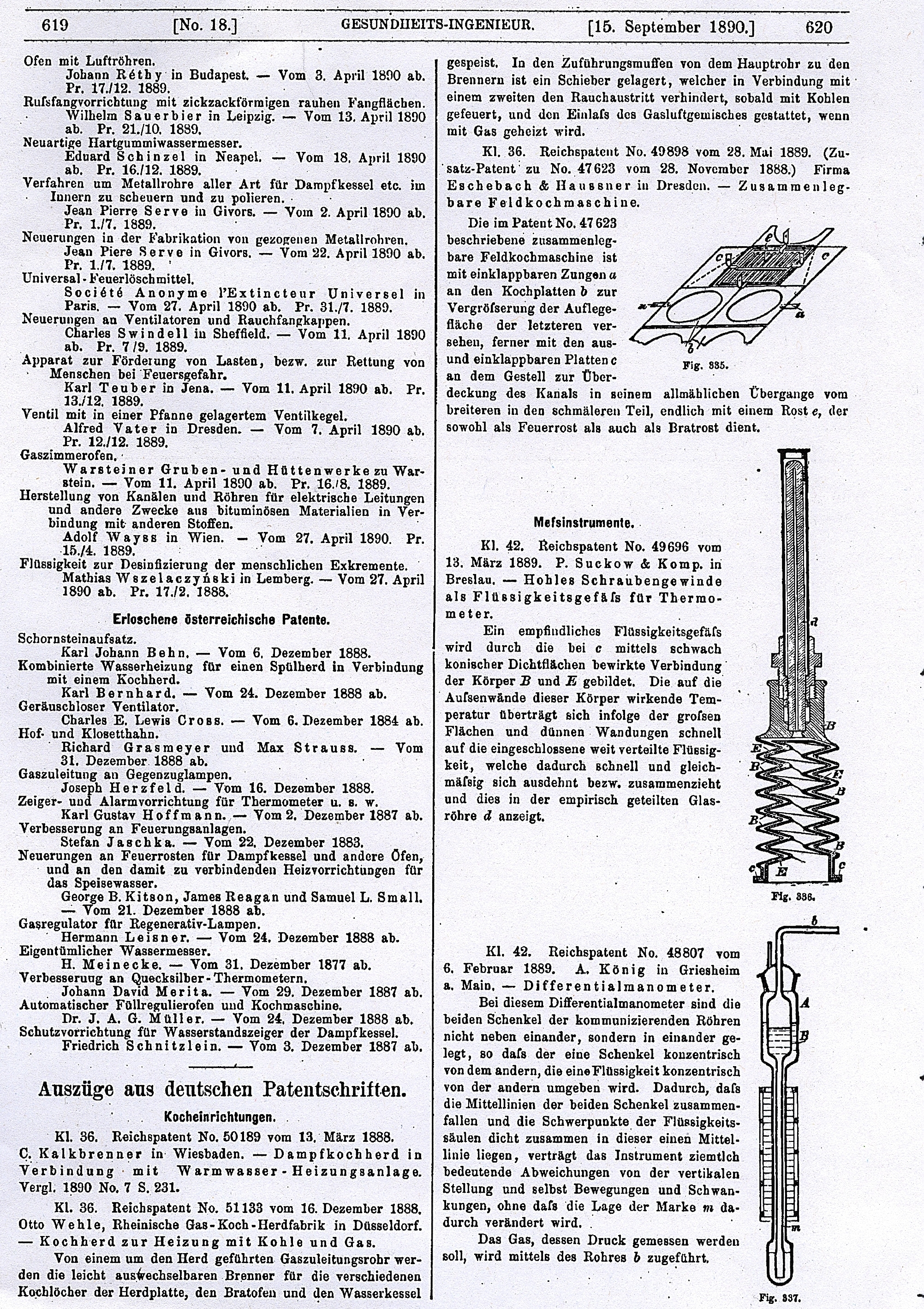 Gesundheitstechnische_Gesellschaft_(Hrsg.),_Gesundheits-Ingenieur._GI.Haustechnik,_Bauphysik,_Umwelttechnik,_Band_13,_Oldenbourg_(Verlag),_München_1890,__(vom_15._September_1890,_Nummer_18)_S._619_und_620.JPG